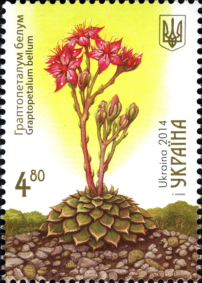 Марка України «Граптопеталум белум Graptopetalum bellum»